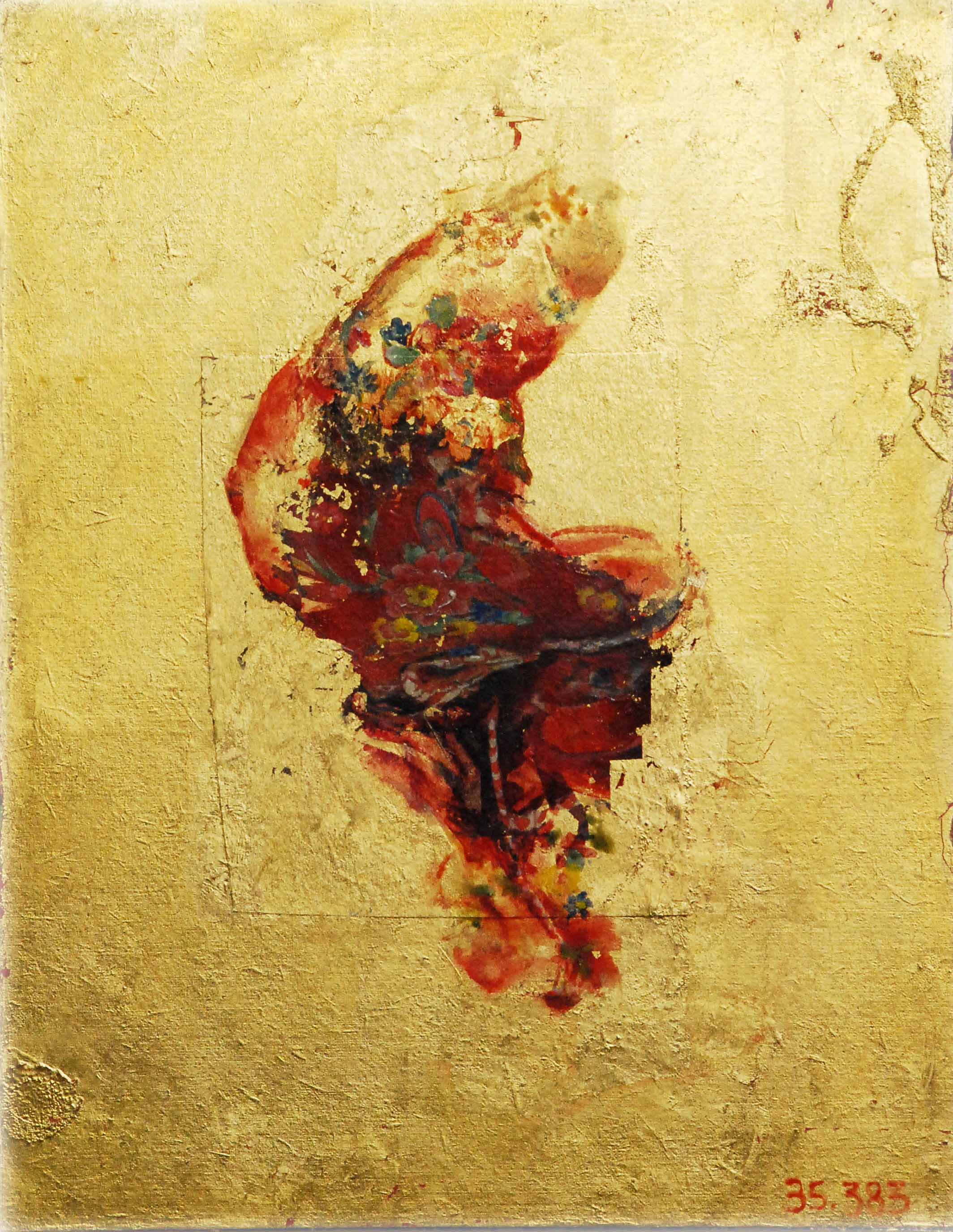 Houten paneel bedekt met bladgoud, waarop een figuur geschilderd is, gebaseerd op een krantenfoto van een dode. Door het beeld vanuit zijn oorspronkelijk horizontaal gezichtspunt rechtop te zetten krijgen het een nieuwe betekenis.